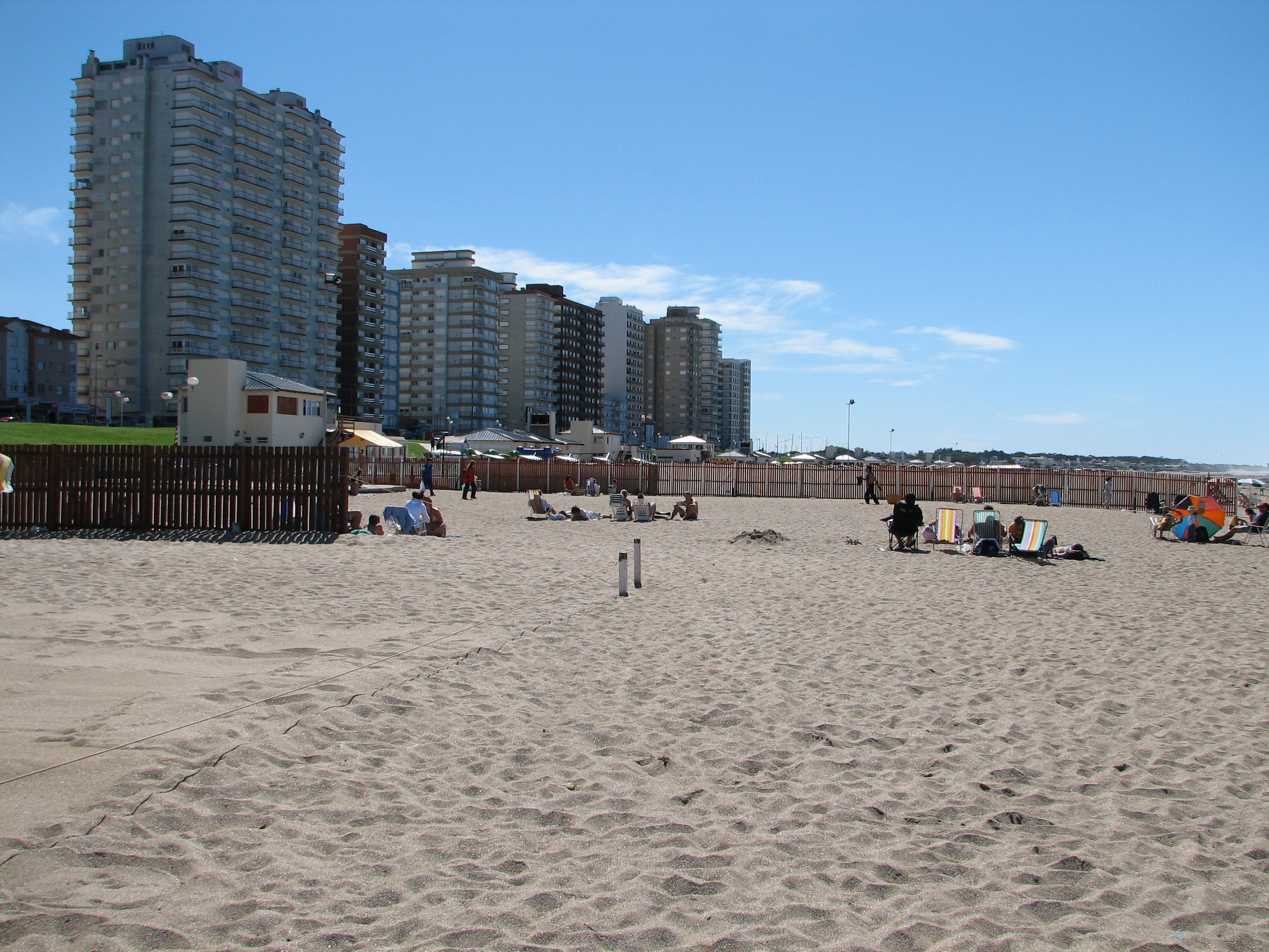 Miramar, Buenos Aires Province, Argentina